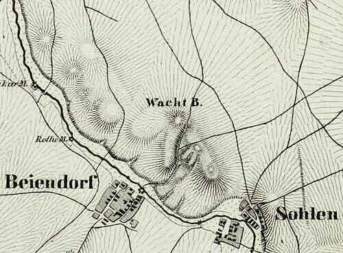 Ausschnitt aus der Karte Albrecht Platts von 1841, Sohlener Berge, unten (westen) Beiendorf und Sohlen, links (Norden) Rothe Mühle und Vikarienmühle an der Sülze, eine Erhebung der Sohlener Berge wird als Wart Berg bezeichnet